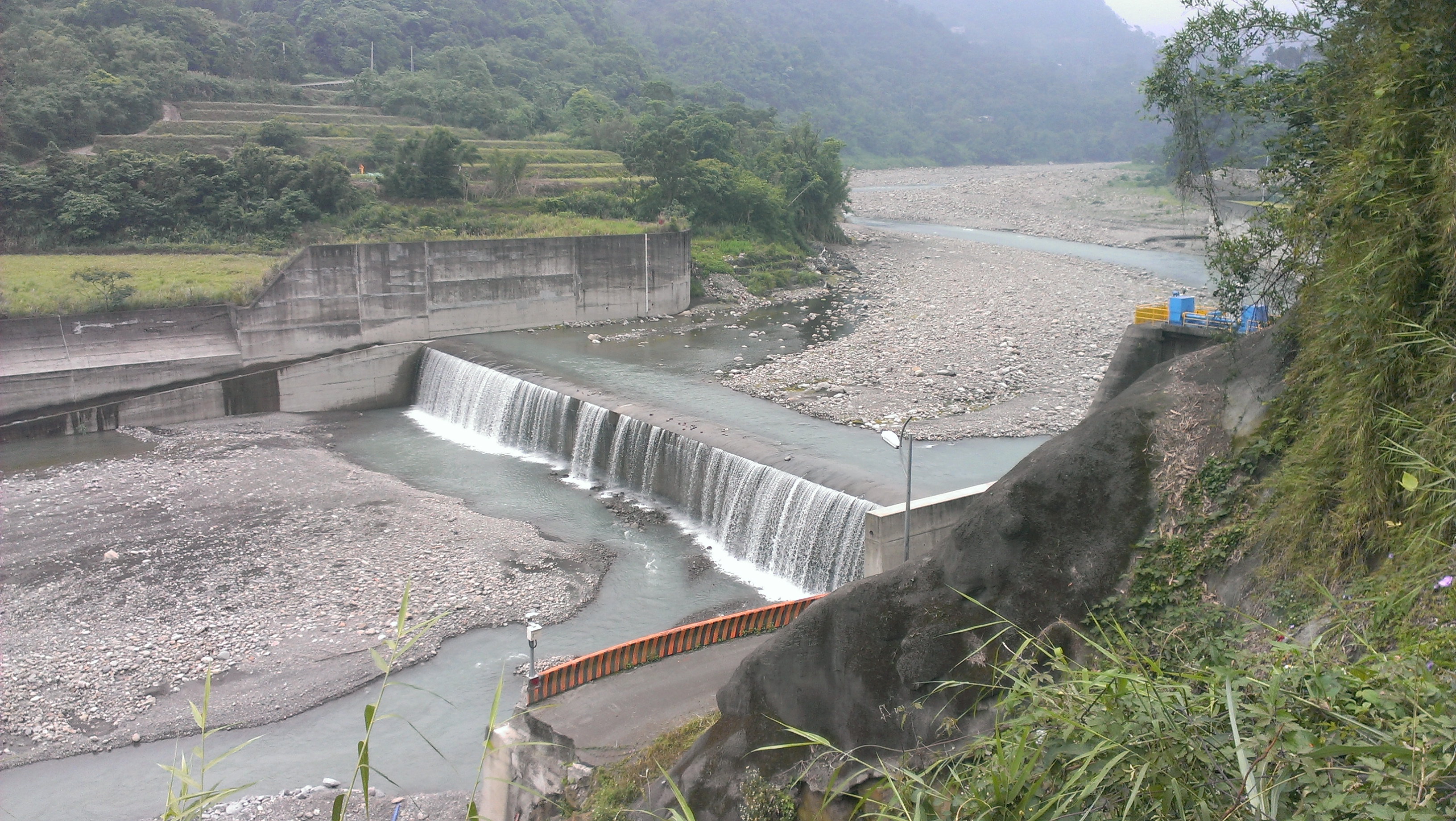 上坪溪之竹東圳源頭一